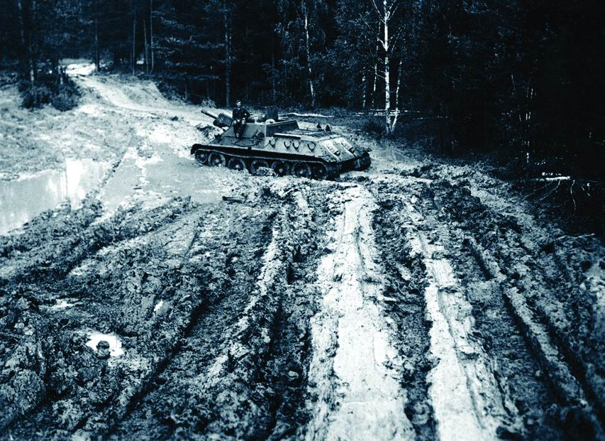 Вид испытательной трассы танкодрома УЗТМ